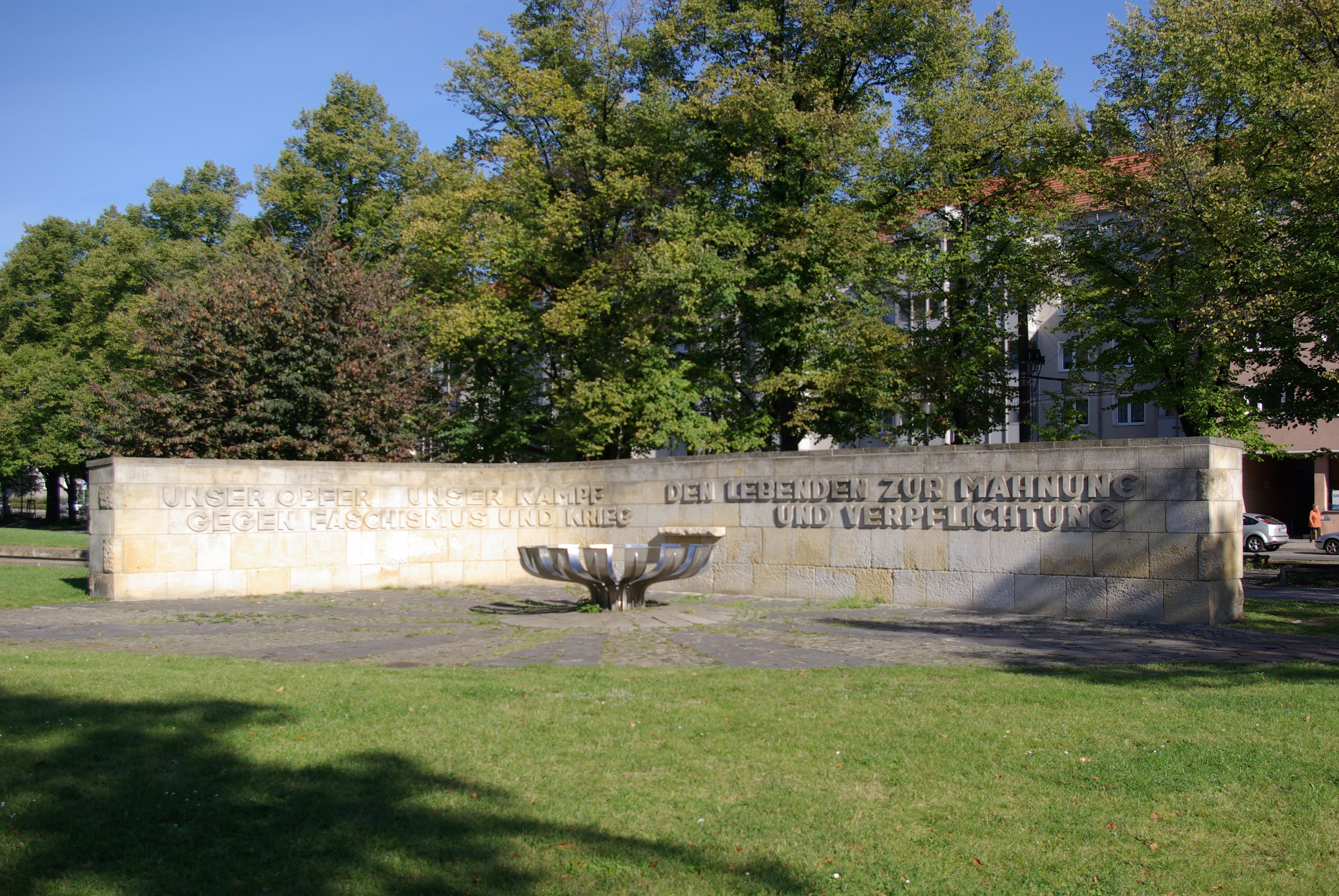 Potsdam in Brandenburg. Das Mahnmal für die antifaschistischen Widerstandskämpfer steht unte Denkmalschutz.